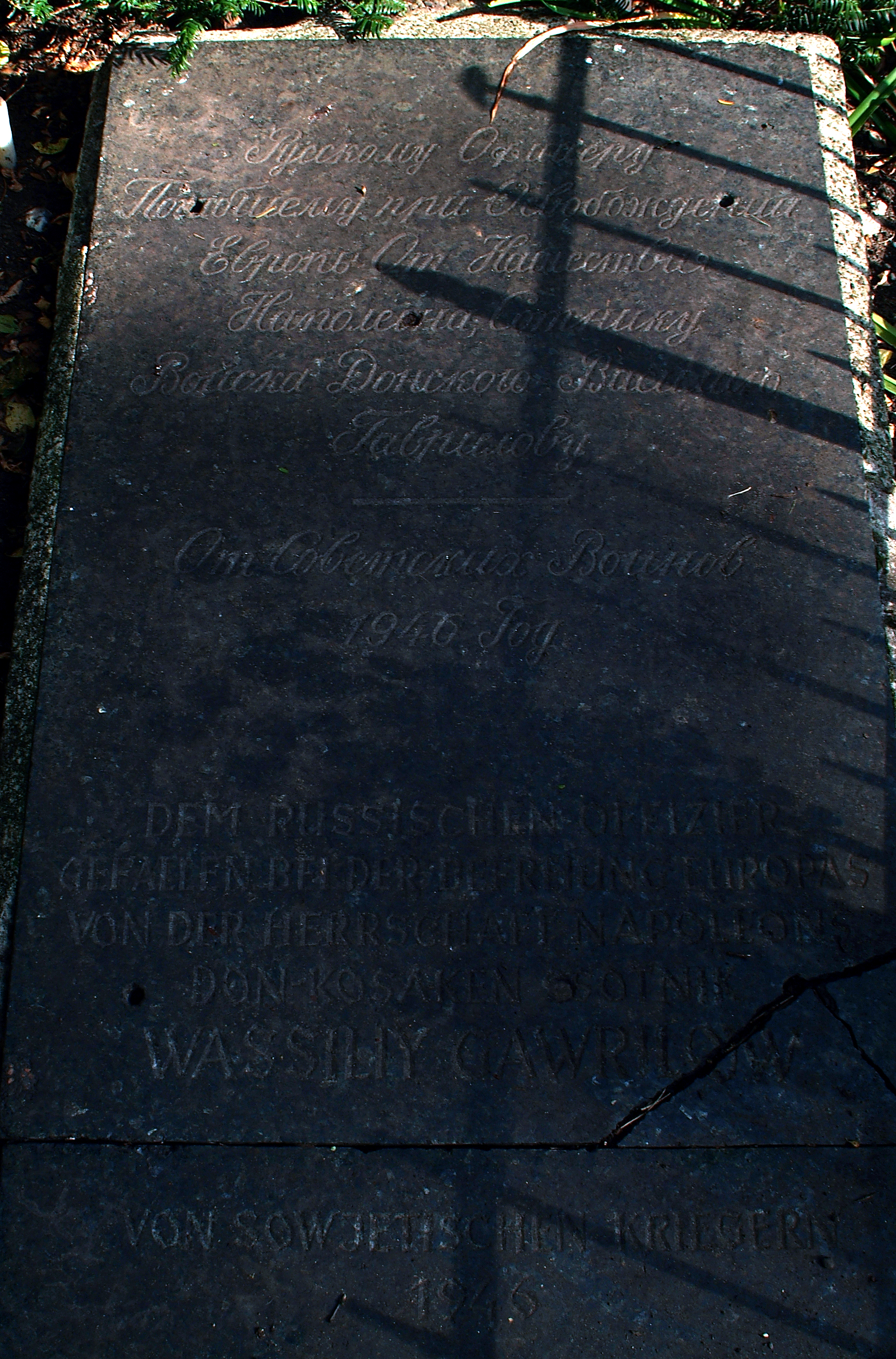 Die 1946 von russischen Soldaten dem orthodoxen Grabkreuz zugefügte Grabplatte mit russischer und deutscher Inschrift. Abschrift der deutschen Inschrift: „Dem russischen Offizier / gefallen bei der Befreiung Europas / von der Herrschaft Napoleons / Don-Kosaken Sotnik [?] / Wassiliy Gawrilow / von sowjetischen Kriegern / 1946“